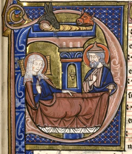 Graduel d'Aliénor - Nativité